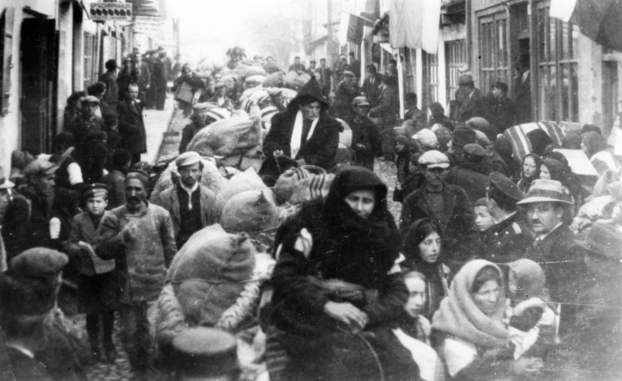 Бегање на Дебраните од балистите, 1942 г.